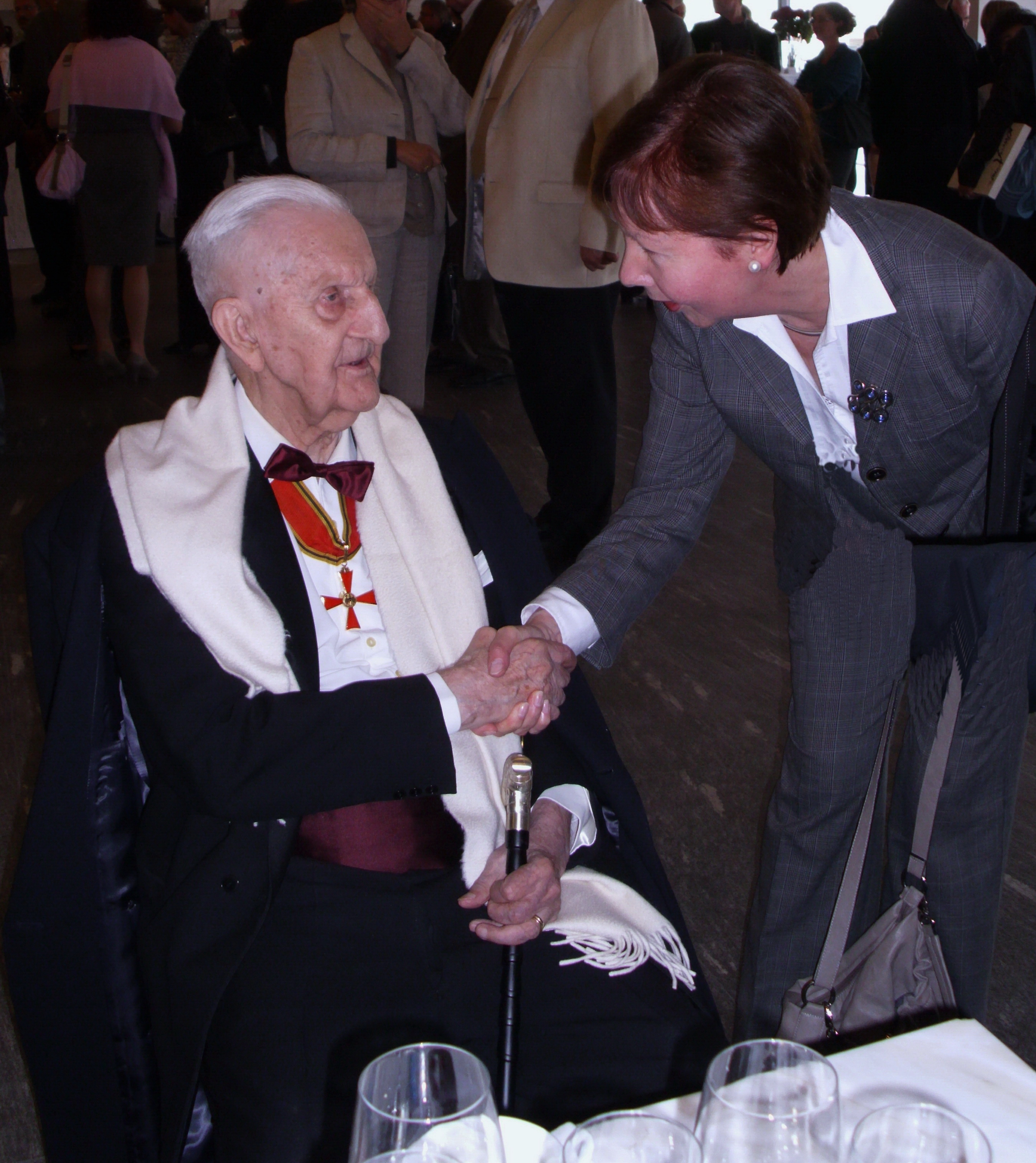 Harro Dicks 100. Geburtstag 9.10.2011 Festakt Staatstheater Darmstadt, mit Vita Huber-Hering als Gratulantin Author: Morphalert